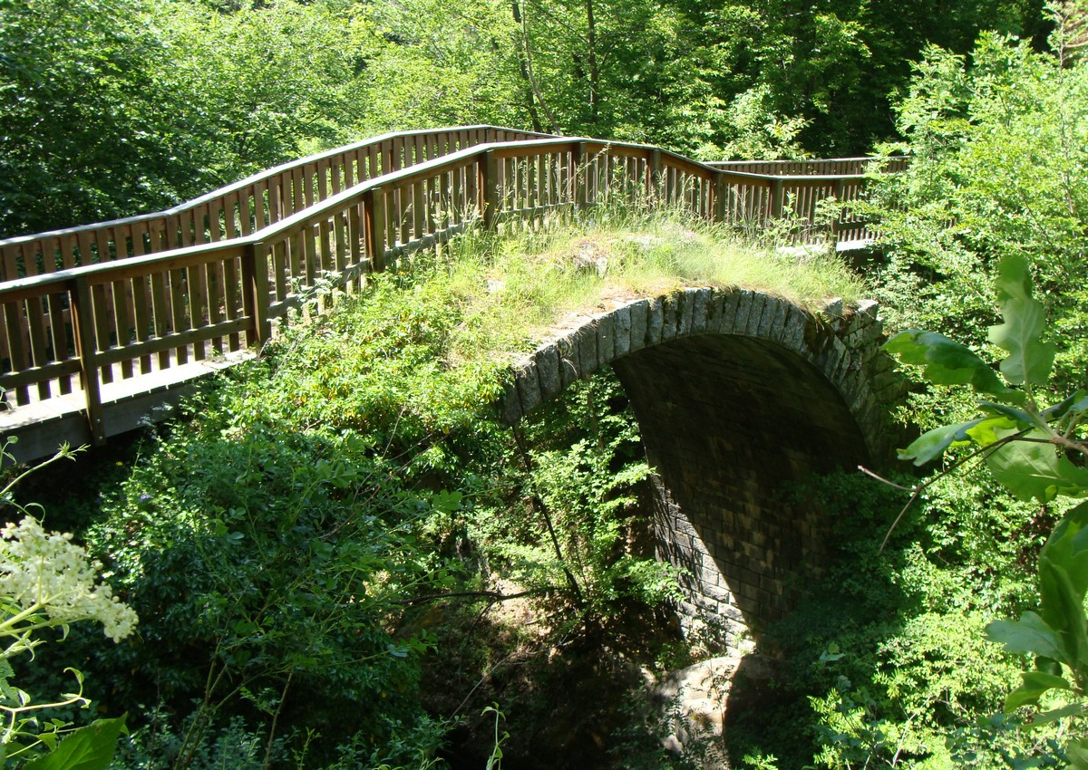 Le Pont du Motty, état actuel, vue d'ensemble : une passerelle en bois a été ajoutée sur l'arche du pont primitif en pierre.